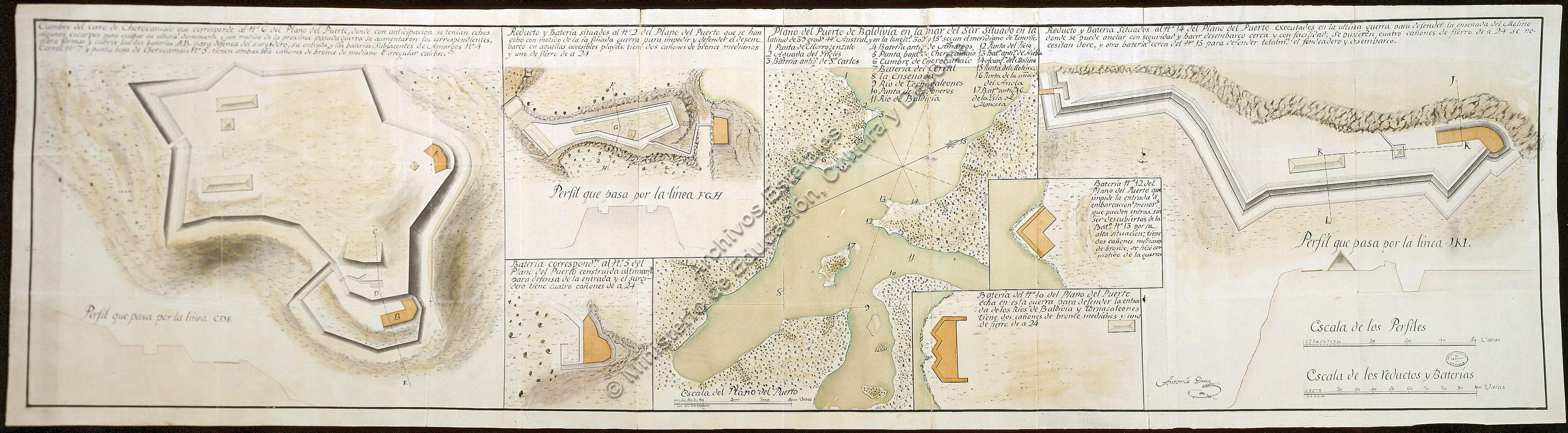 Mapa del sistema defensivo de Valdivia efectuado por Antonio Duce